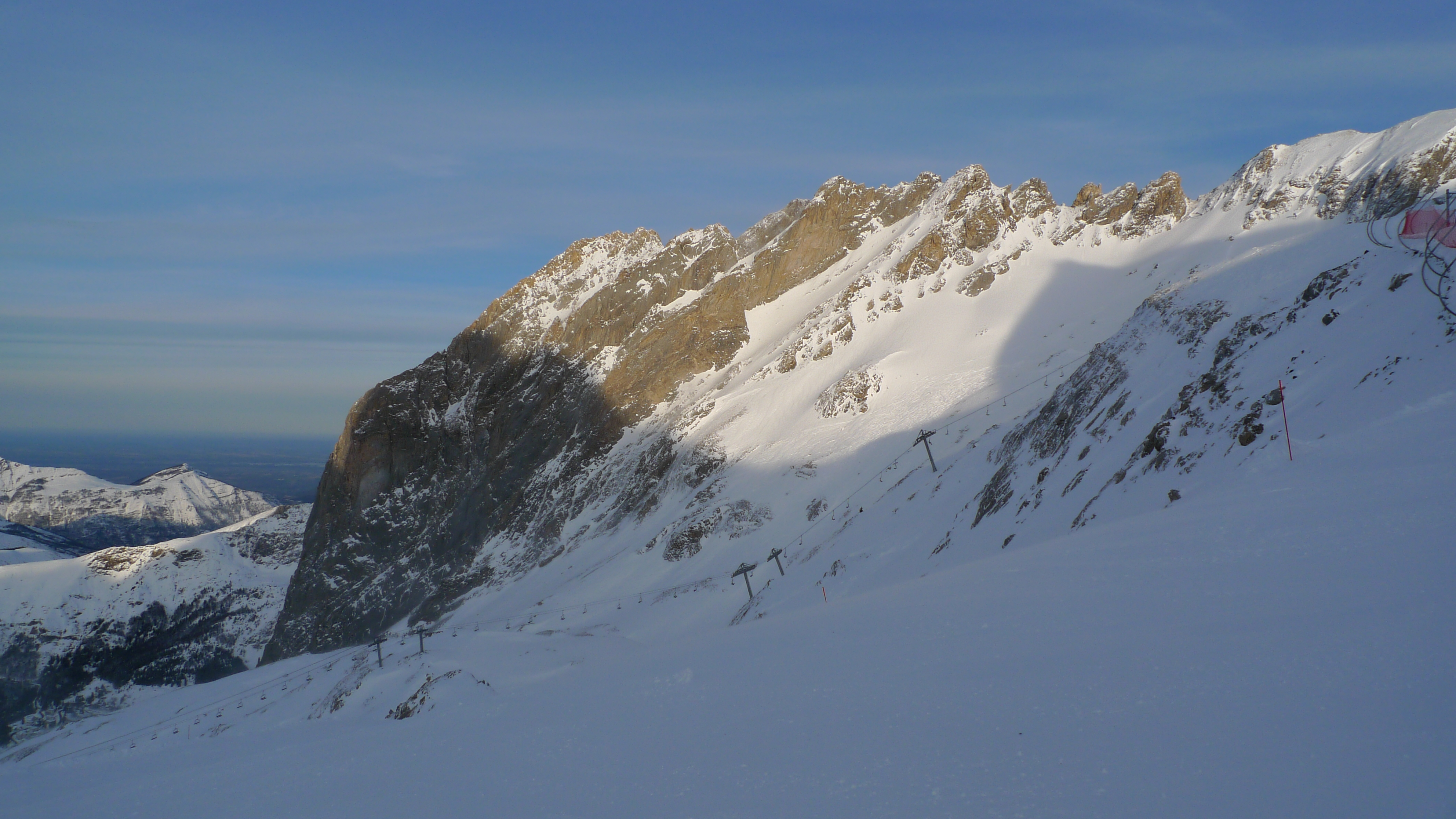 Crête du Pène Médaa, station de Gourette, massif de Ger